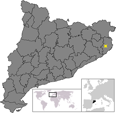 Localització de la Bisbal d'Empordà. Location of La Bisbal d'Empordà in Catalonia.